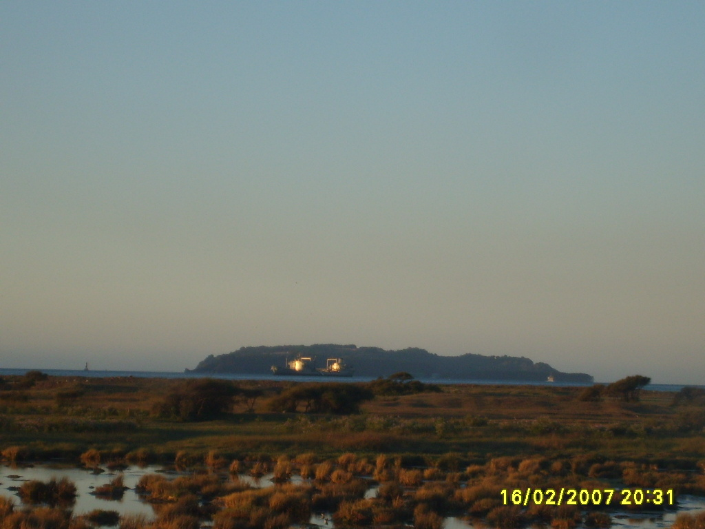 Isla Quiriquina, Quiriquina Island